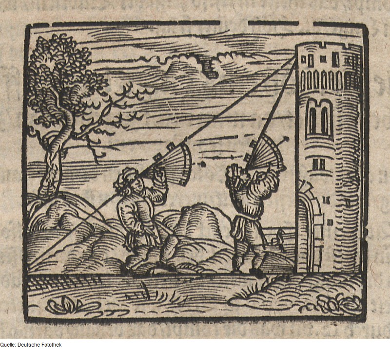 Original image description from the Deutsche Fotothek Geometrie & Vermessung & Vermessungsinstrument & Quadrant & Turm